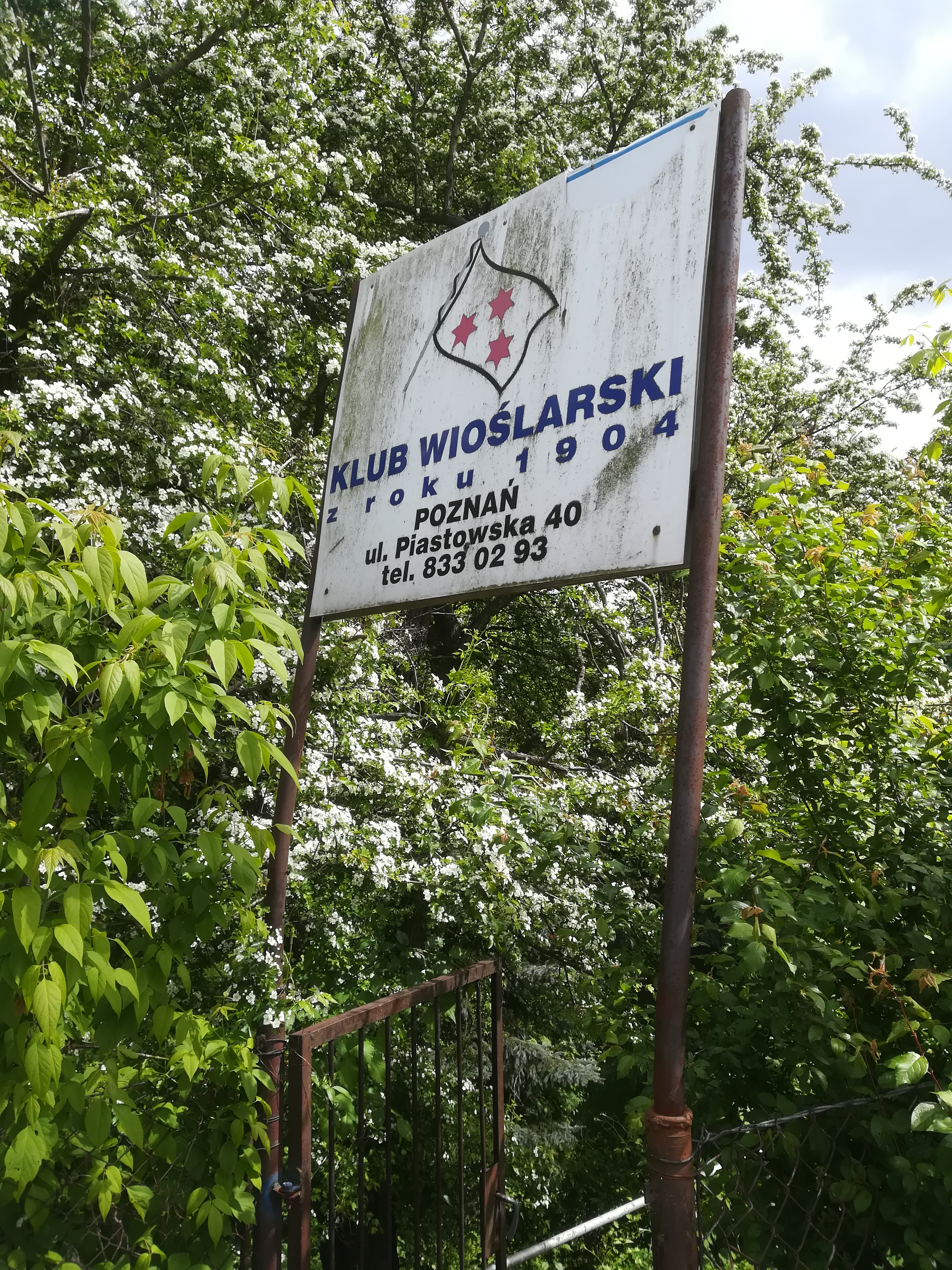 Klub Wioślarski z 1904 w Poznaniu nad Wartą.